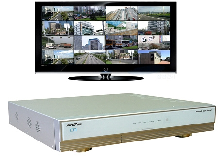 16-ти канальный видеорегистратор AddPac AP-SNR1016